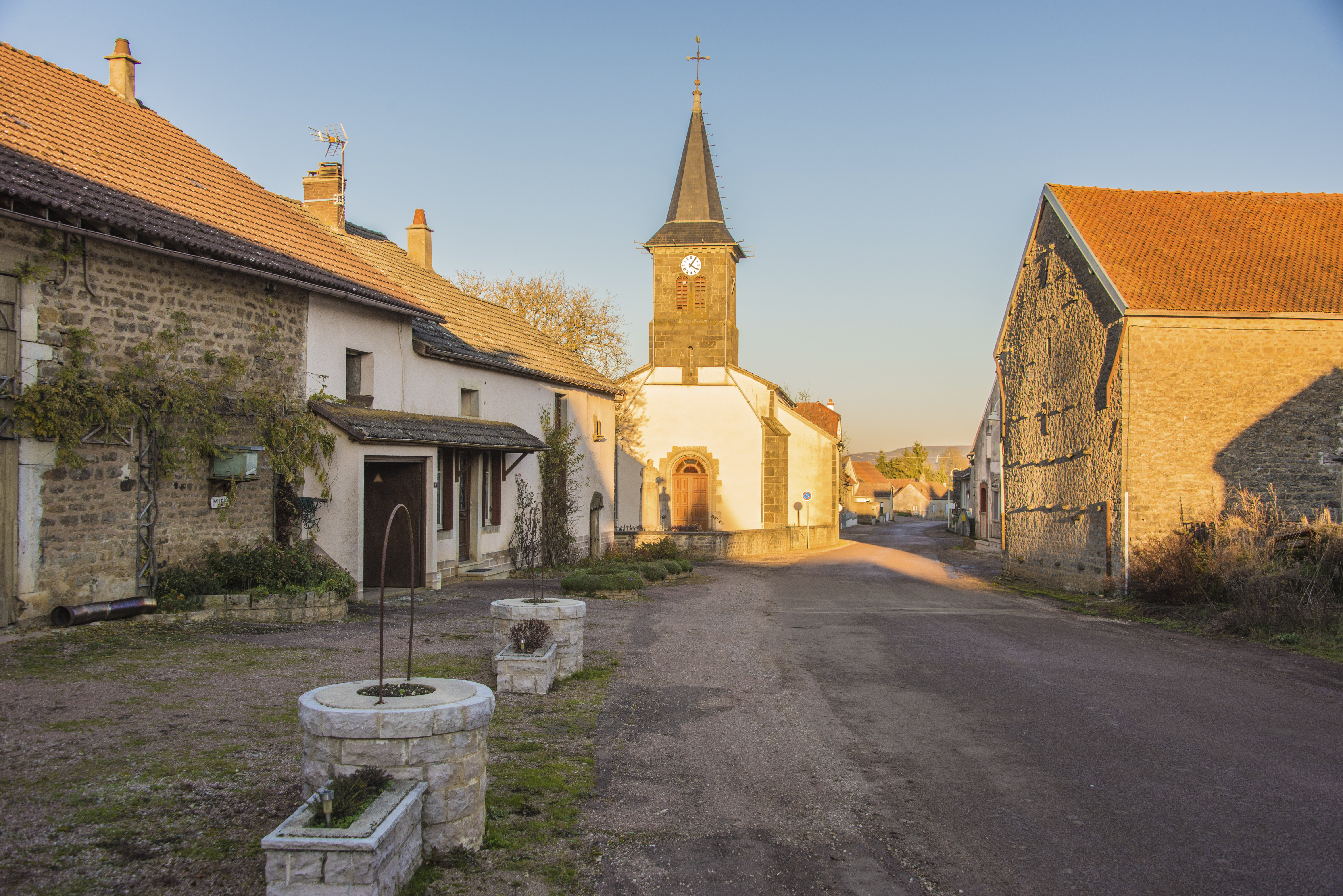 Cussy-le-Châtel